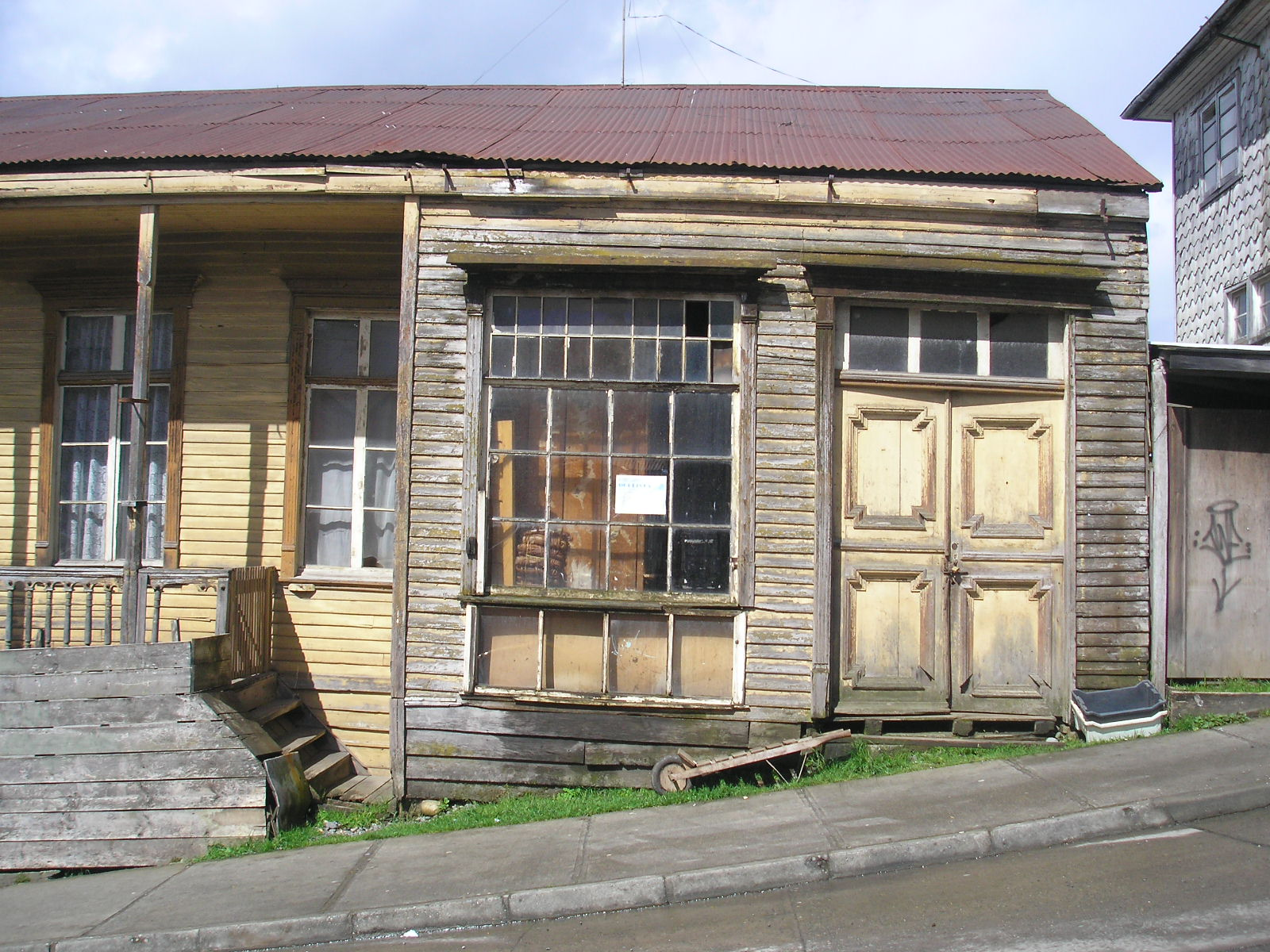 Calle Centenario, Chonchi, Chiloé, Chile. This is a photo of a national monument in Chile: 1694